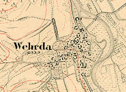 Topografische Karte von Wehrda bei Marburg (1:25000).